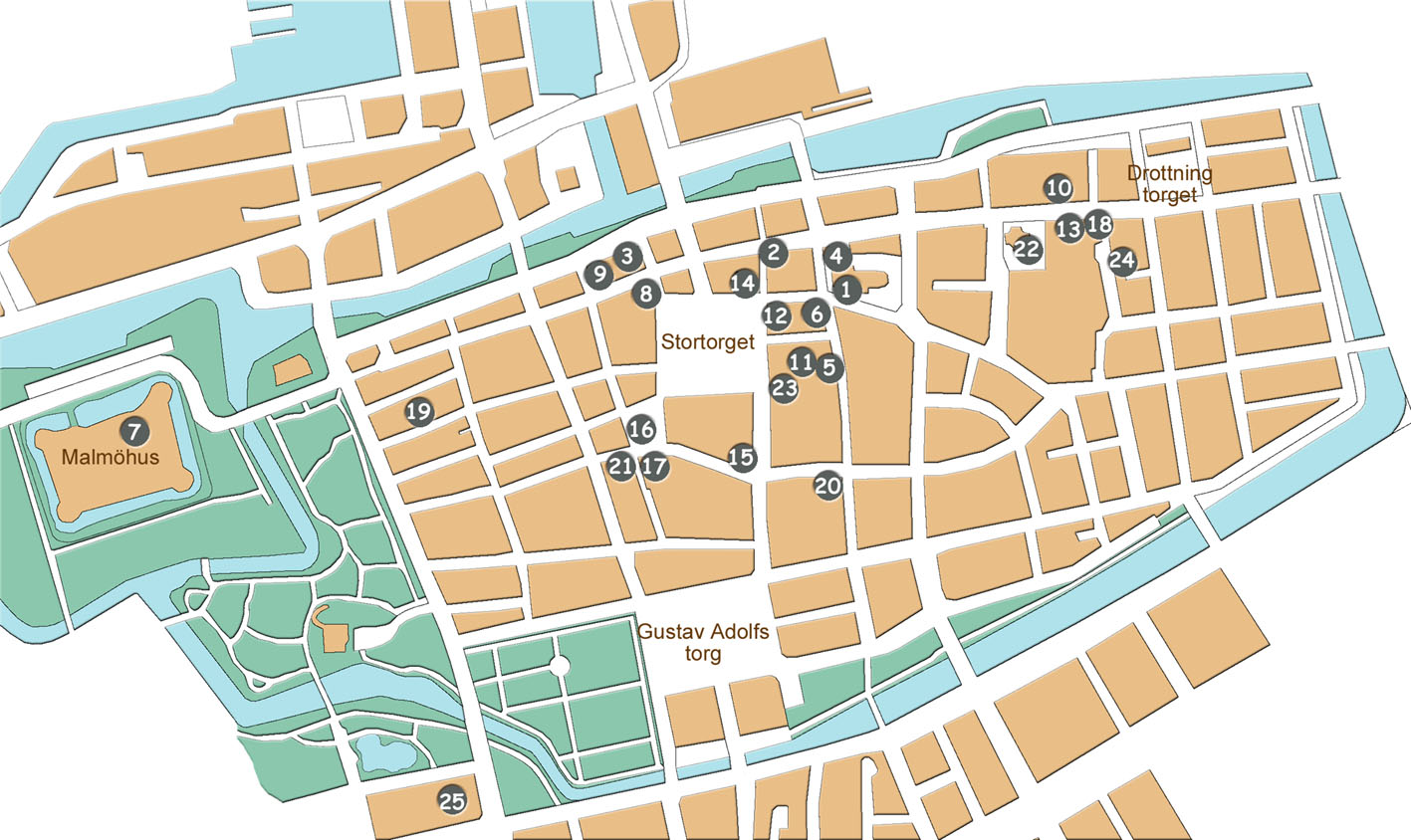 Karta över sevärdheter i Malmö, Sverige.